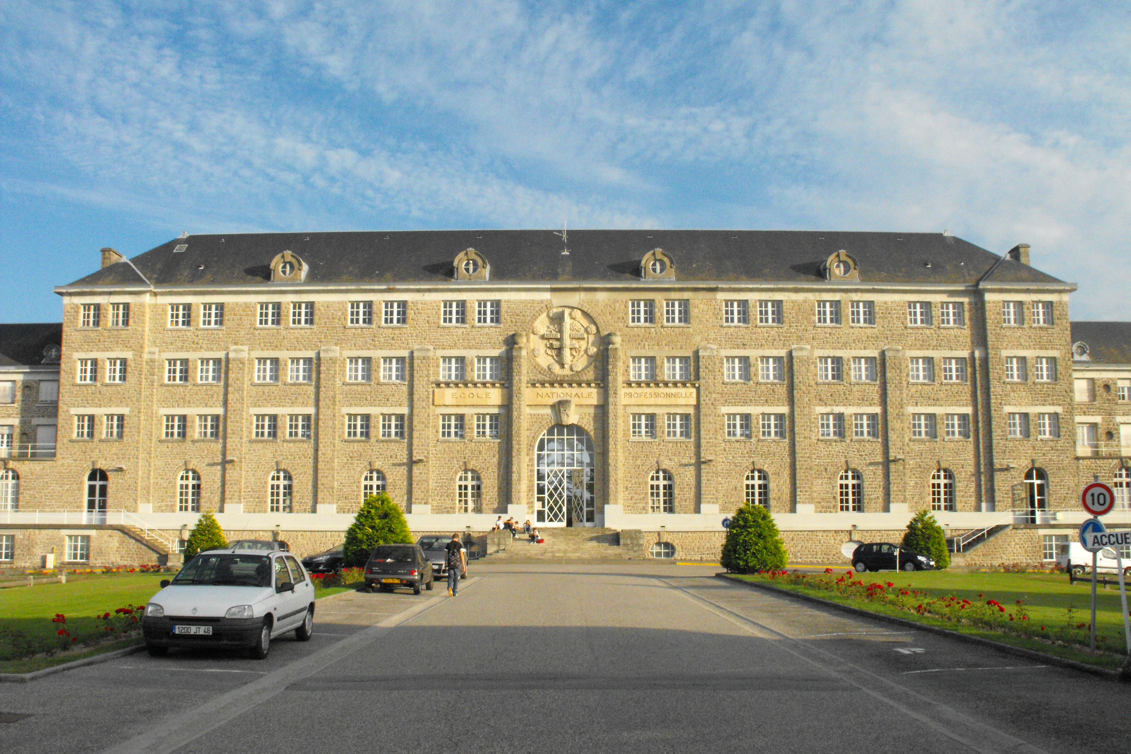 Vue du Lycée Pierre Caraminot (ex École Nationale Professionnelle) à Égletons, en Corrèze (France)